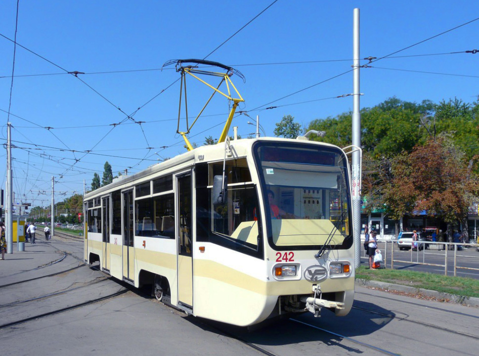 ул.Ставропольская